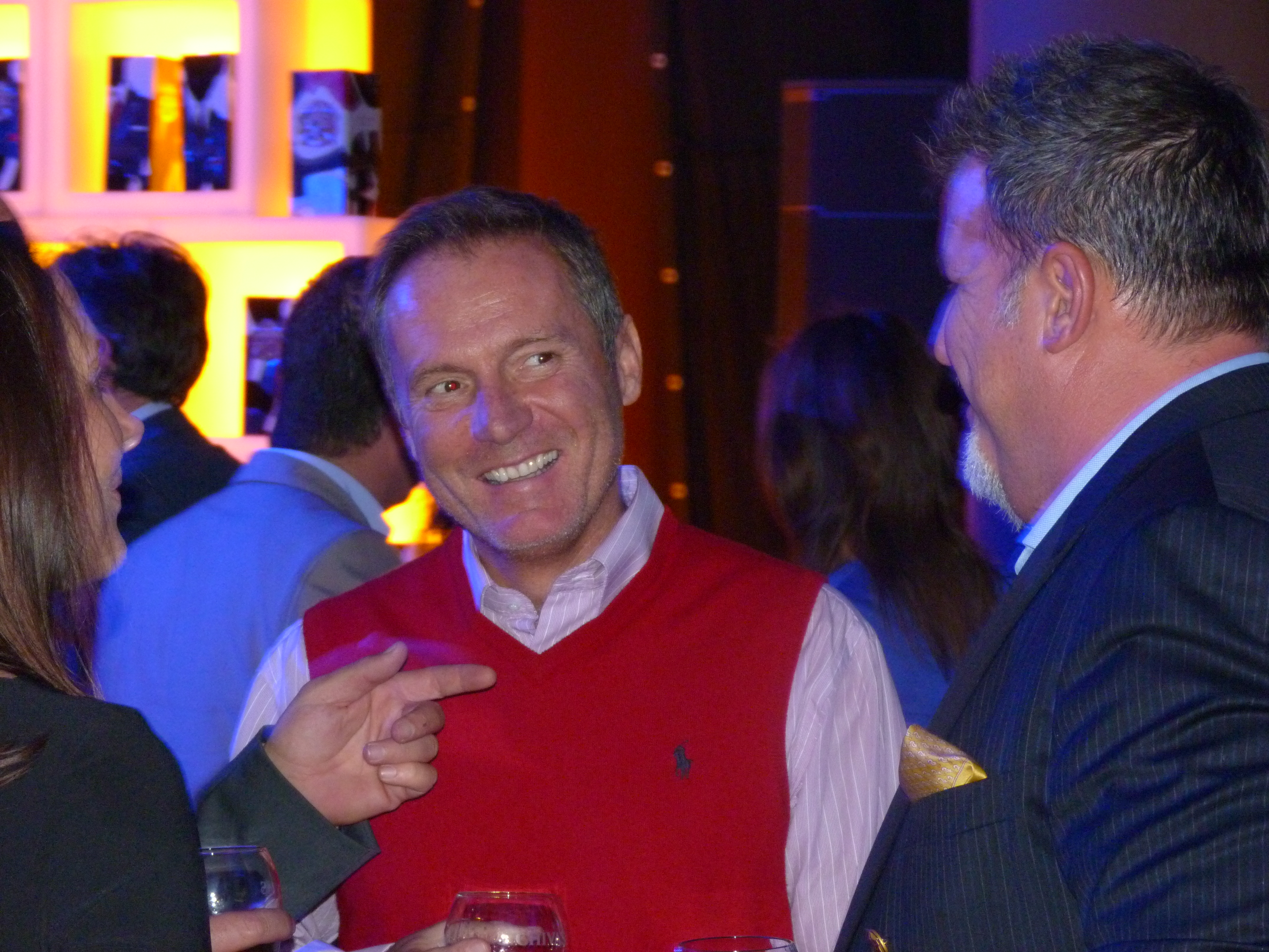 A Fiat Grand Cherokee-t a Chivas Luxury Klub a Boscoló Szállodában (Budapest, New York épület, Erzsébet körút 9-11) mutatták be. A bemutató vendége volt Árpa Attila, a Fiat által szponzorált Argo 2 film rendezője is. Árpa Attila (979). A Jeep Grand Cherokee bemutatása (963, 964, 967, 971), Argo 2 werkfilm bemutatása (976). A Fiat csoport Magyarországra helyezi regionális központját. Az új régiós központ „Fiat Group Automobiles Central and Eastern Europe” néven működik tovább Magyarországon. A 2013-as évben az új koncepció jegyében a Fiat csoport megerősíti jelenlétét a Chivas Luxury Club életében is. Az együttműködést a társaság ügyvezető igazgatója, Stekl László jelentette korábban be. Források: A Chivas Luxory Klub lovagjai Fiat és a Chivas Luxory Klub 300 milliót kapott az Argo 2 ©© Derzsi Elekes Andor, Budapest, 2013, You are authorised to use these photos and vids under Creative Commons – even for commercial, for profit purposes. Photos must be attributed to Derzsi Elekes Andor. All of the photos and vids in the Metapolisz DVD line are under Creative Commons and can be used even for commercial – for profit – purposes. Recommended Citation Derzsi Elekes Andor: Metapolisz DVD line